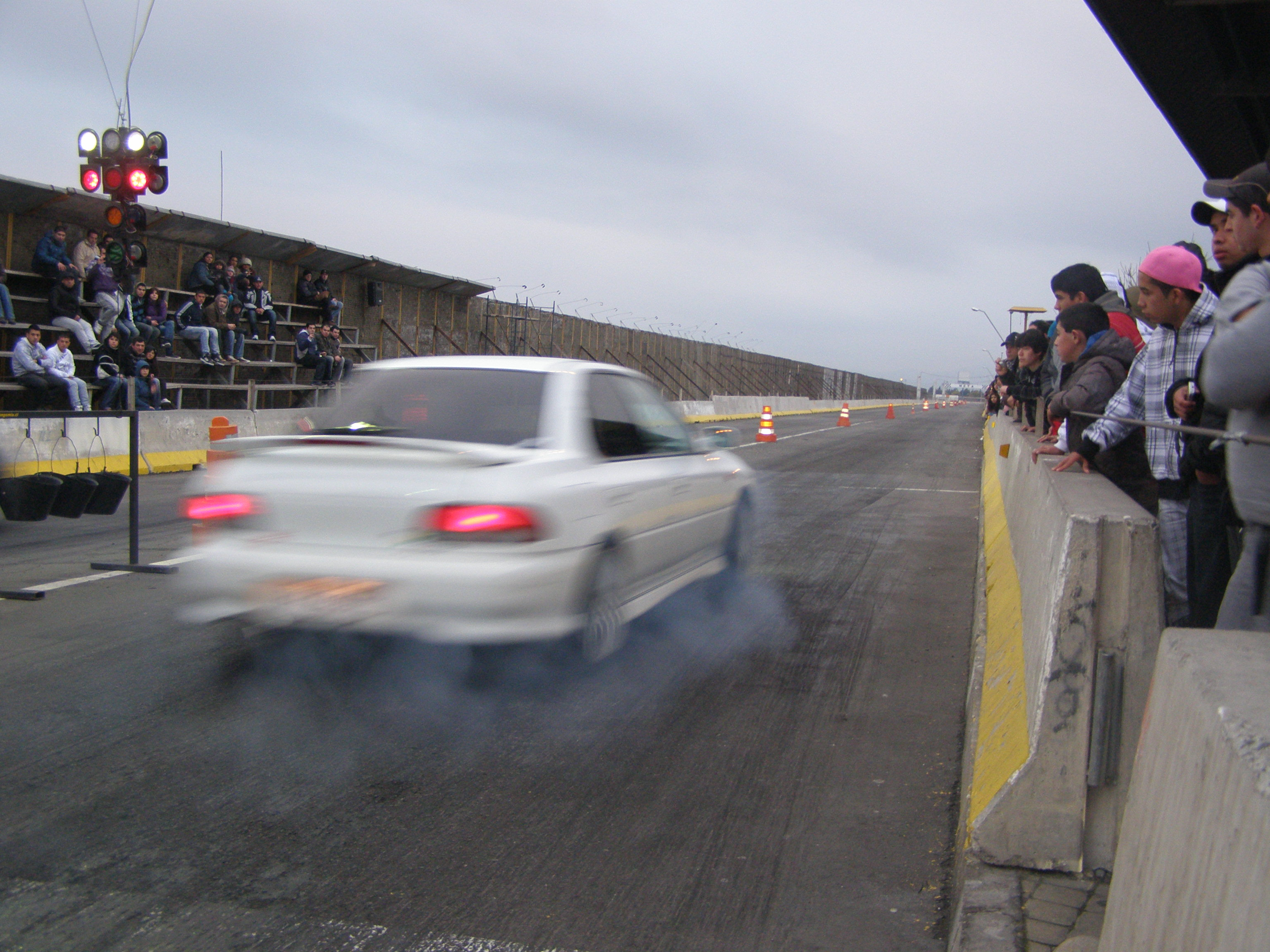 Subaru Wrx corre mersan